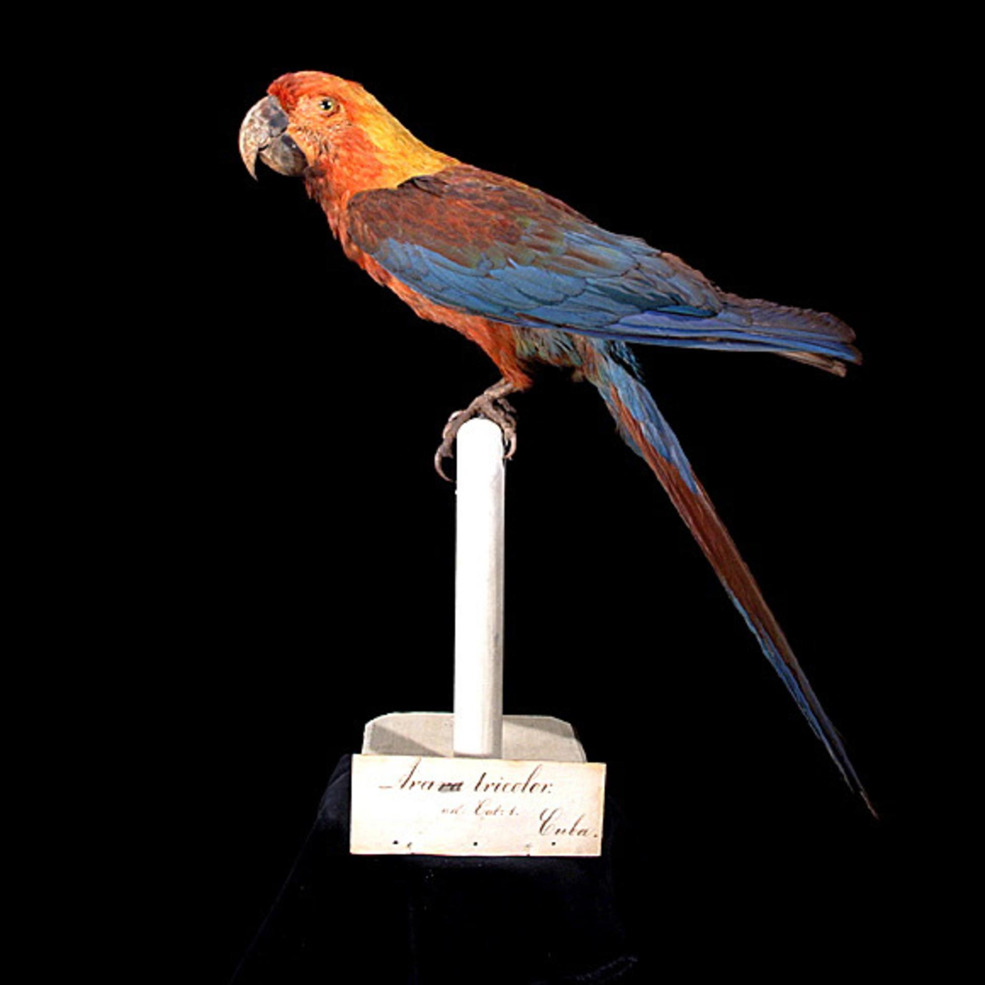 Ara tricolor Bechstein, 1811